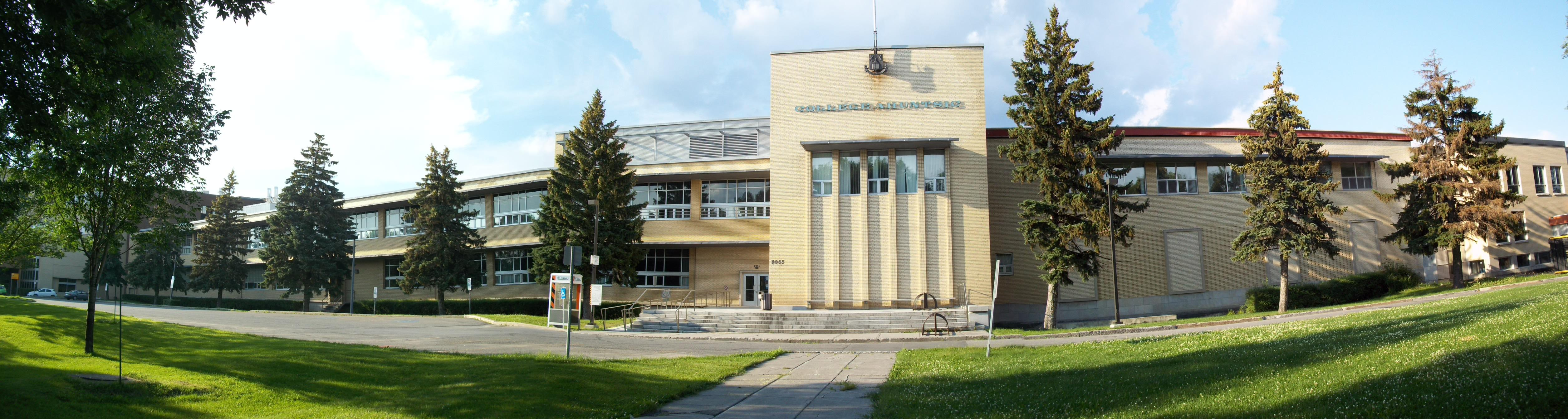 Vue panoramique du Collège Ahuntsic, Montréal